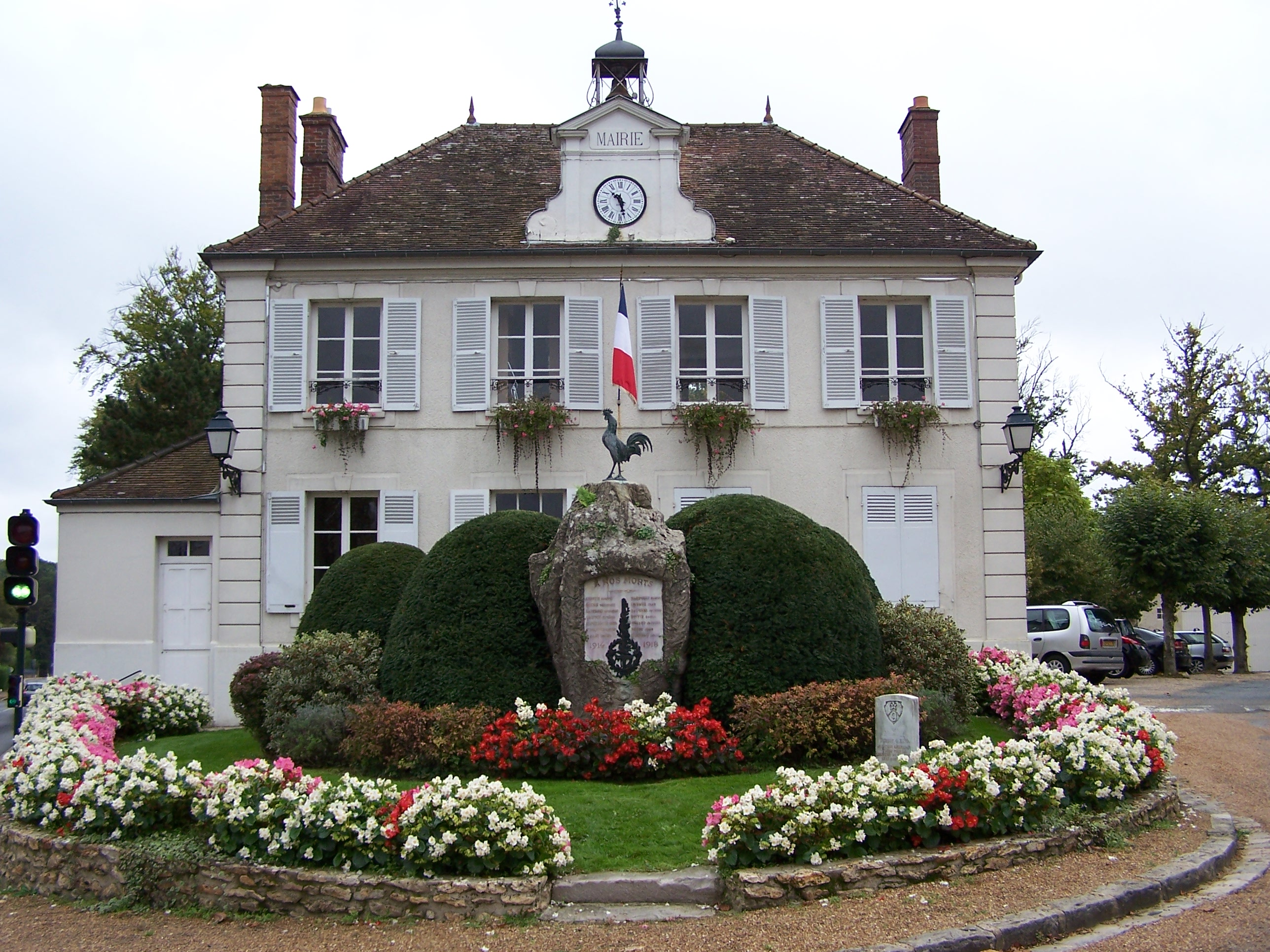 Mairie et monument aux morts de Clairefontaine-en-Yvelines (Yvelines, France)